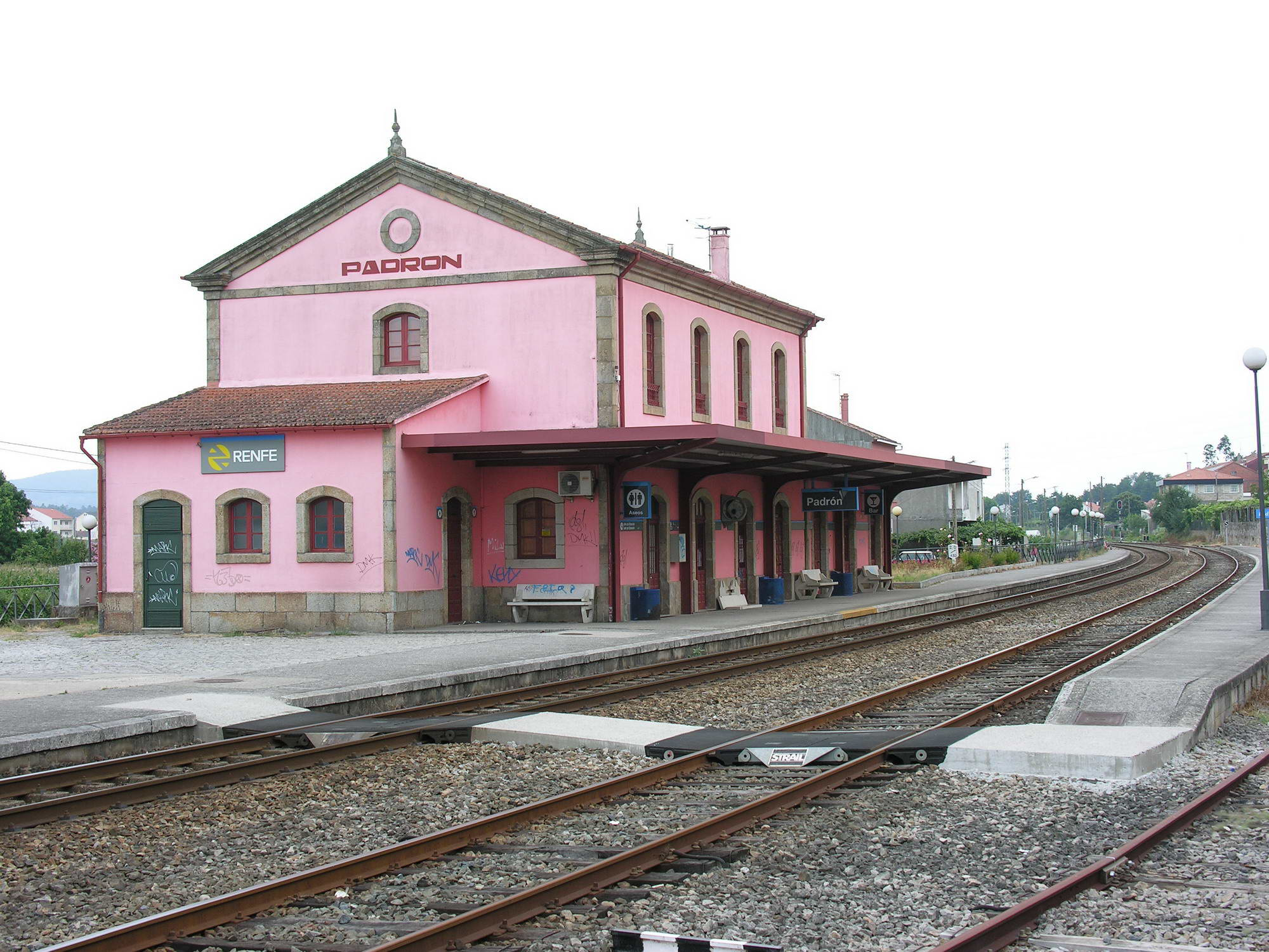 Estación do tren, Padrón, Galicia Publish by= Luis Miguel Bugallo Sánchez.